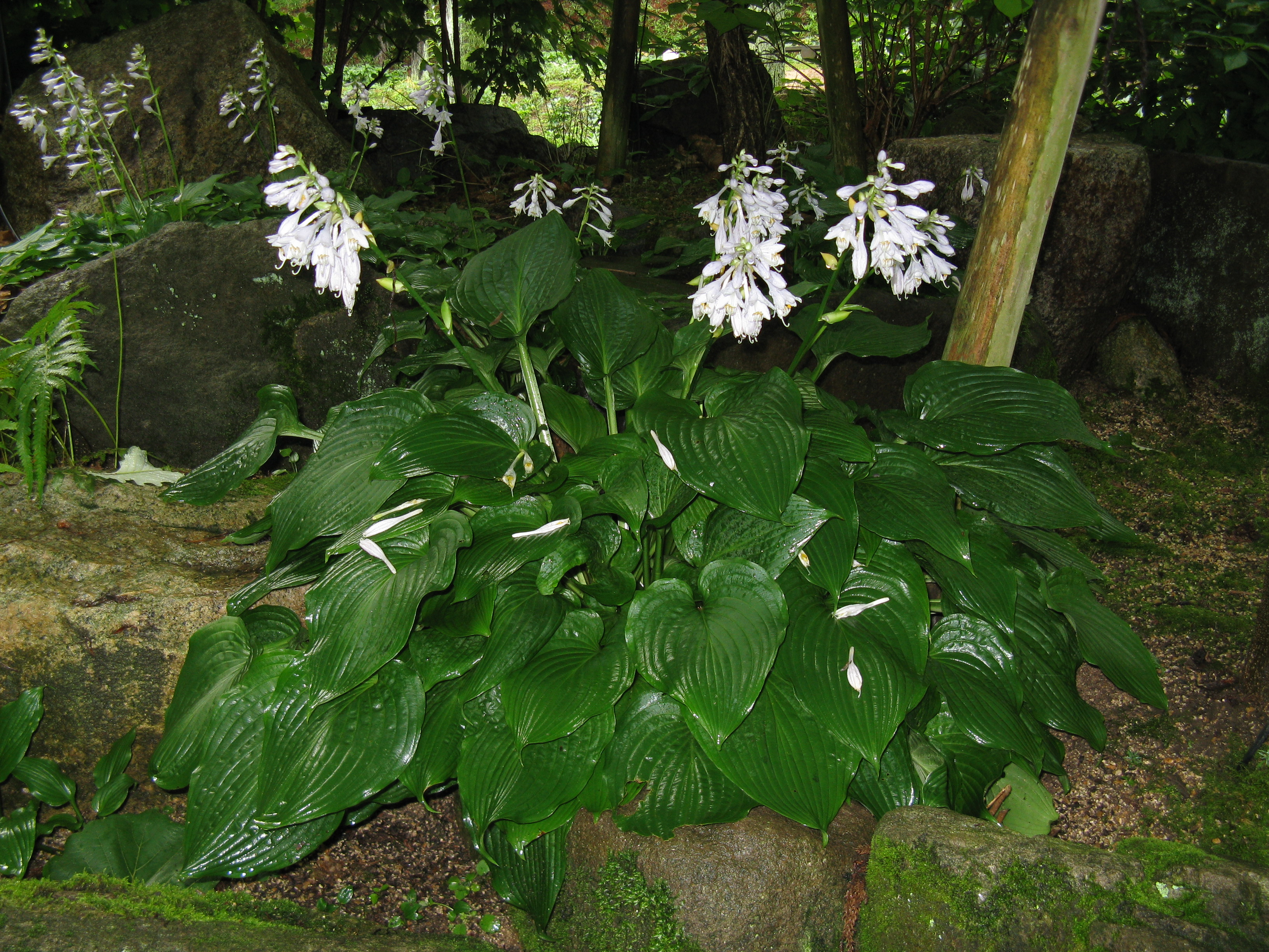 Hosta sieboldiana